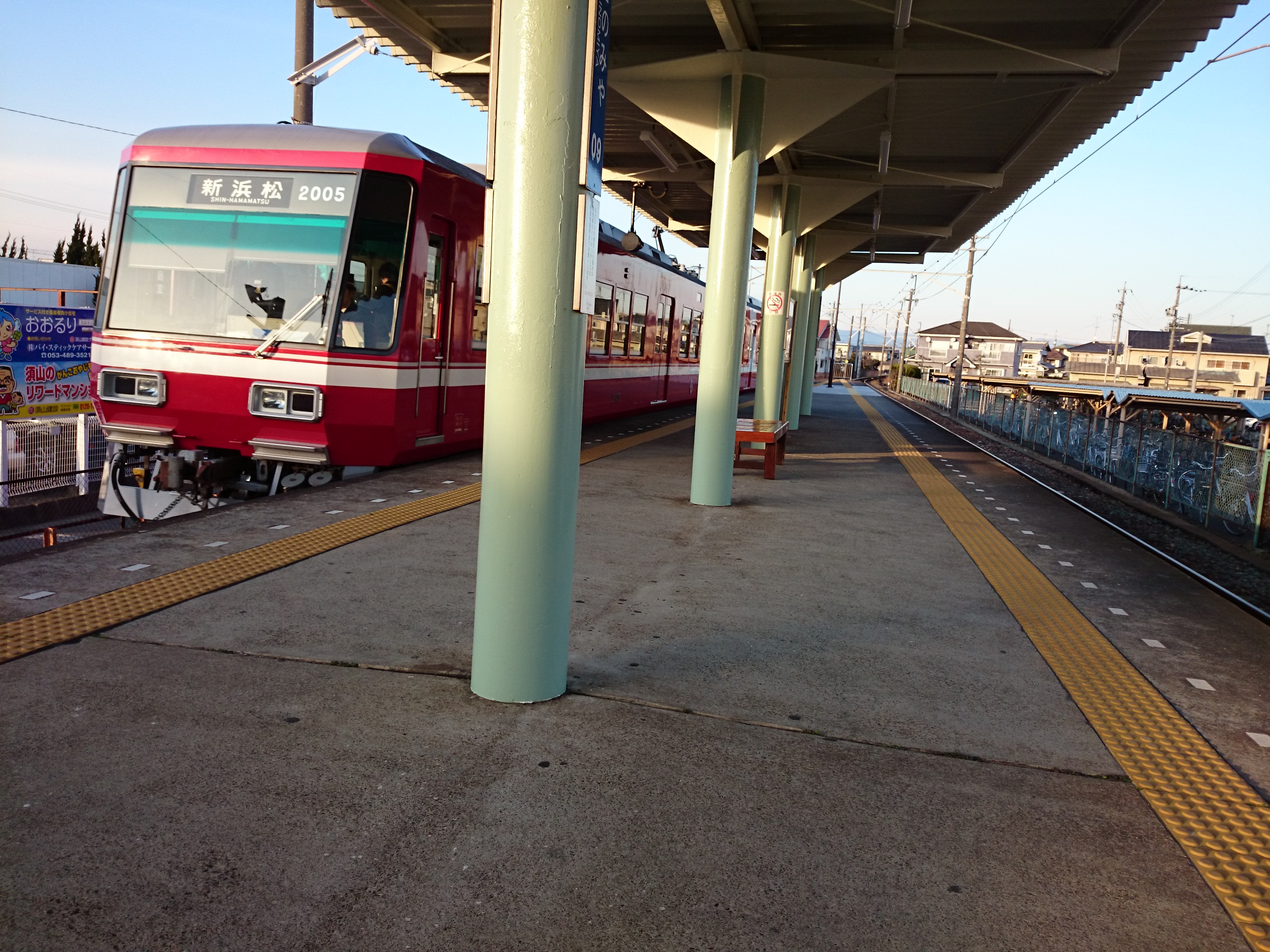 さぎの宮駅 ホーム